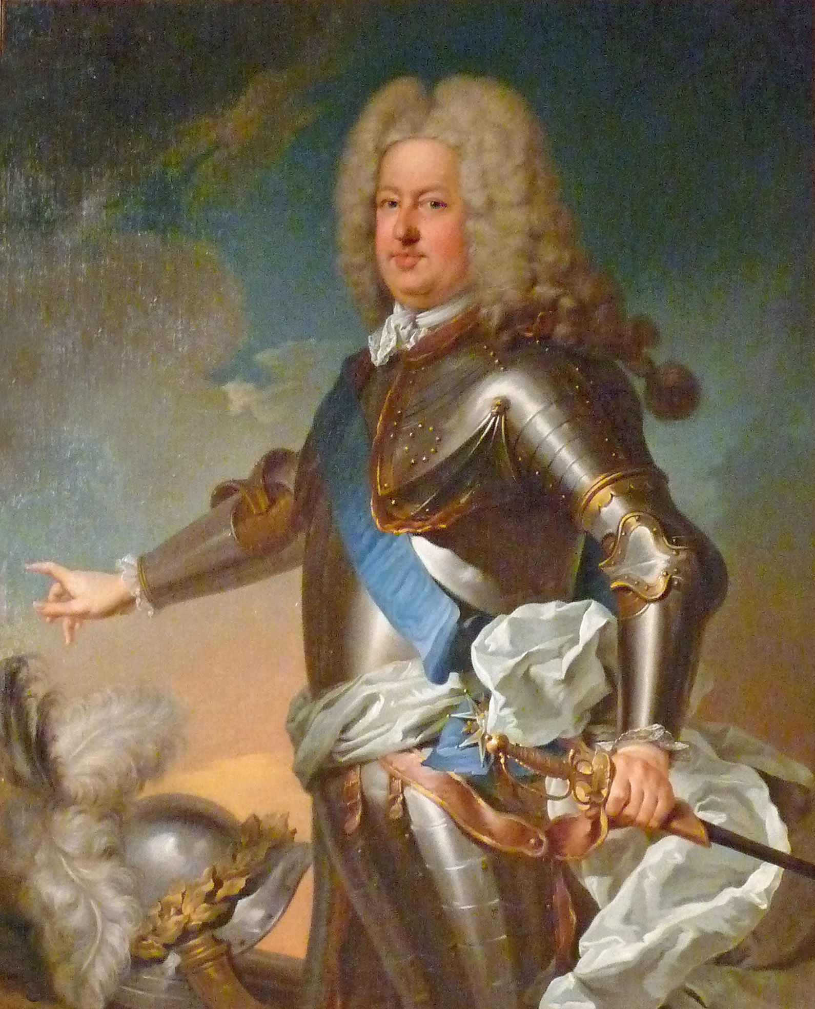 Copie ancienne de la toile réalisée en 1727 pour le roi Louis XV (Château de Versailles).